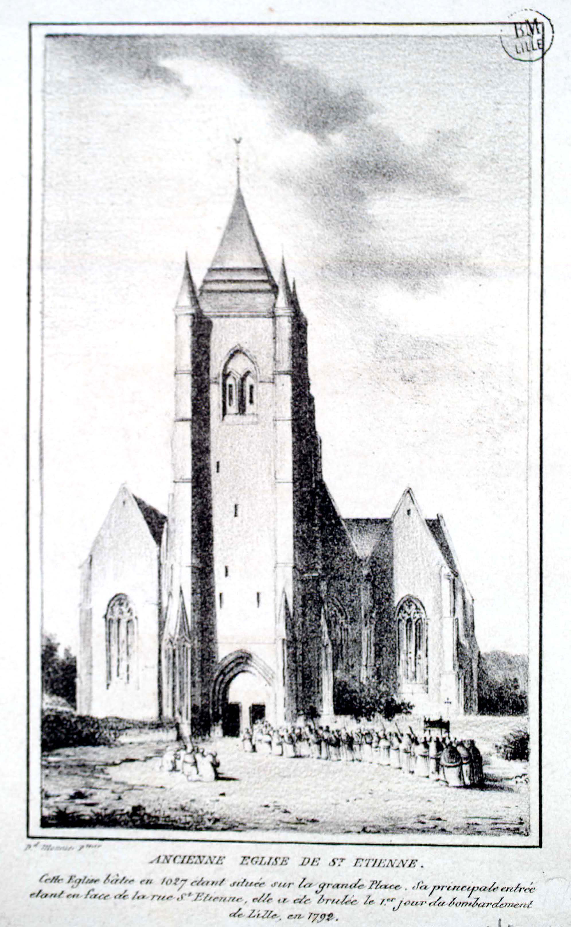 Pour le fichier recadré à utiliser dans les articles voir : Titre du document: ANCIENNE EGLISE DE ST ETIENNE. Type de document : 15 x 9,5 cm